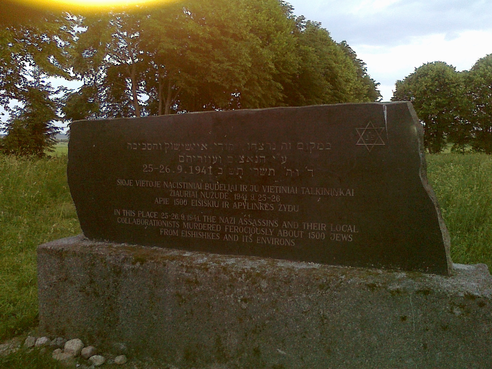 Obelisk ku pamięci pomordowanych żydów 25-26.09.1941